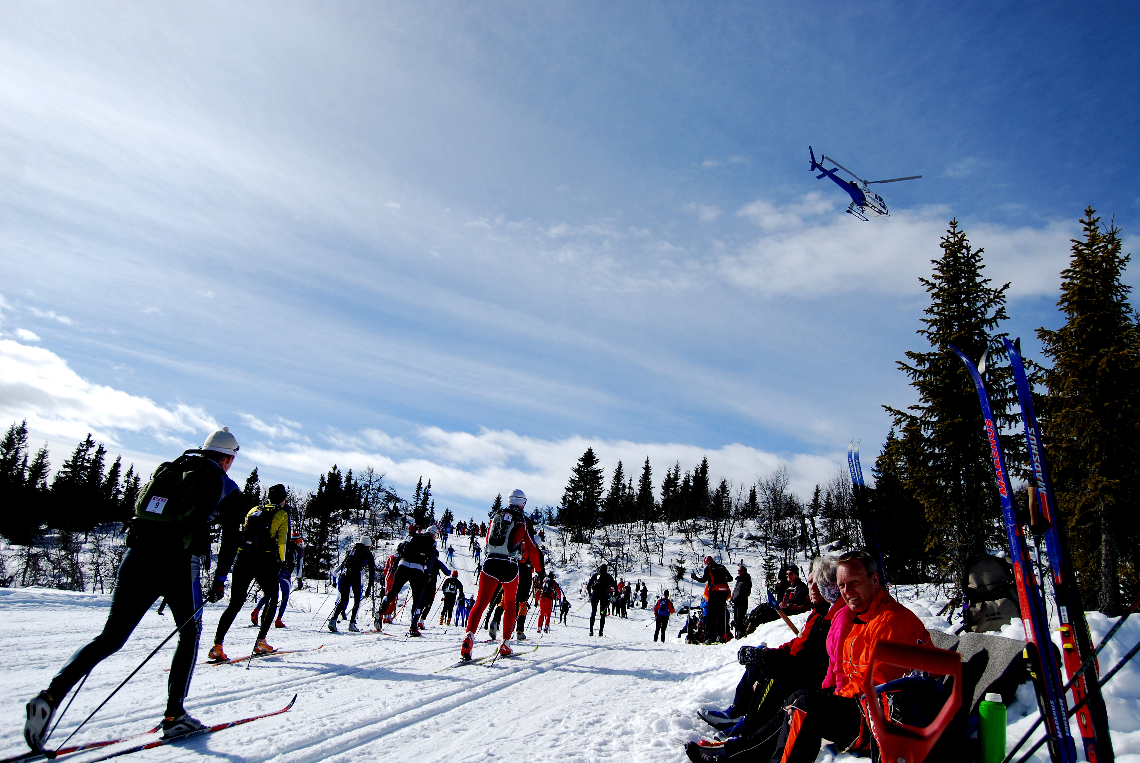 Bildet er tatt 20. mars 2010 ved Midtfjellet ca 30 km ut i løypa.